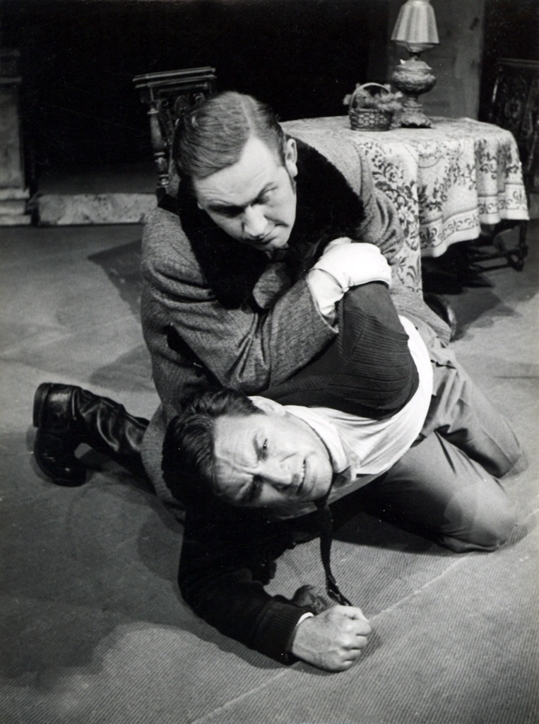 Matej Bor, Zvezde so večne, Drama SNG v Ljubljani. Na fotografiji: Bert Sotlar (Andrej Brinar), Jurij Souček (Kajetan).